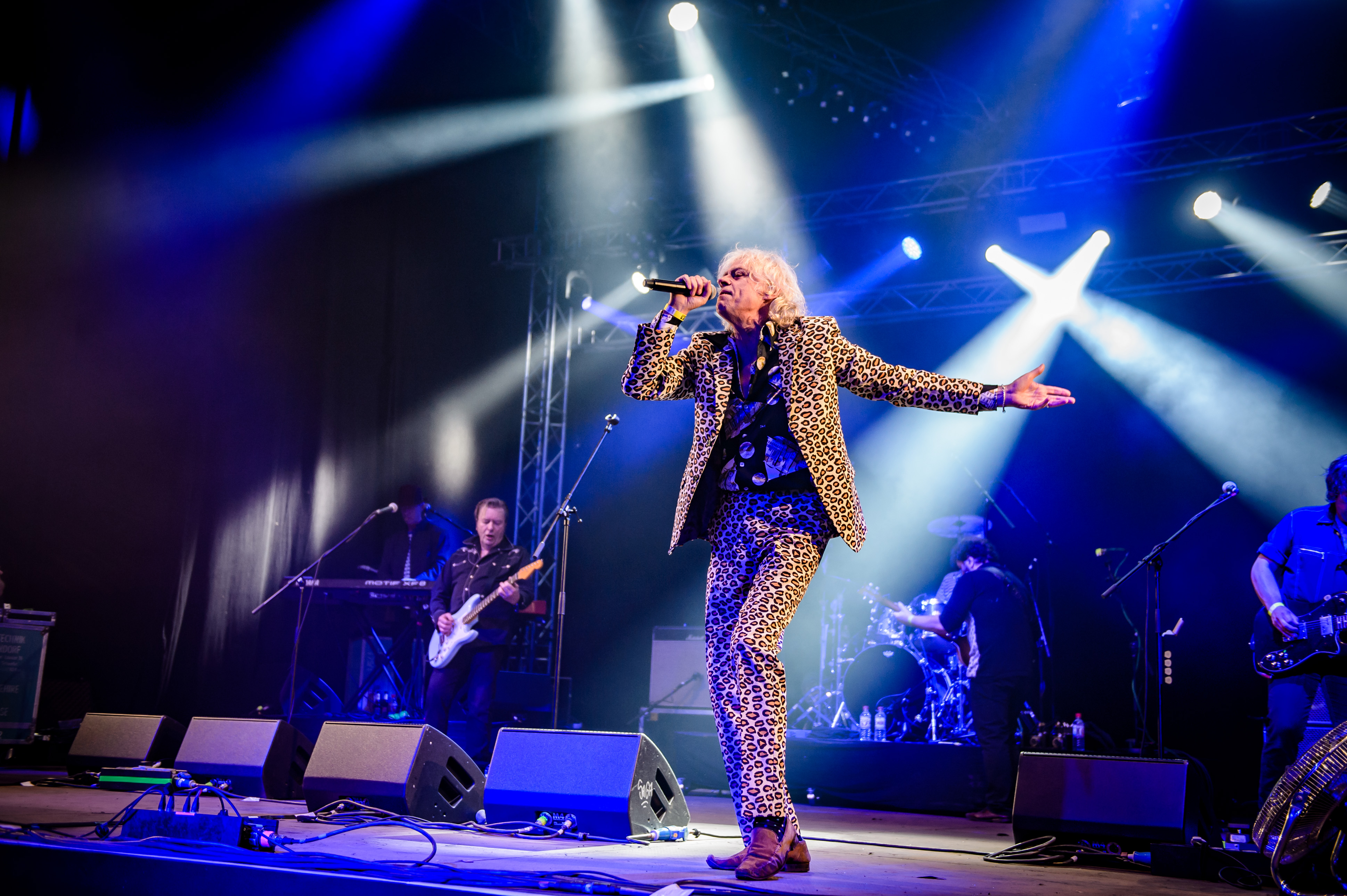 'Wacken Open Air 2017; Wacken': 'Boomtown Rats'